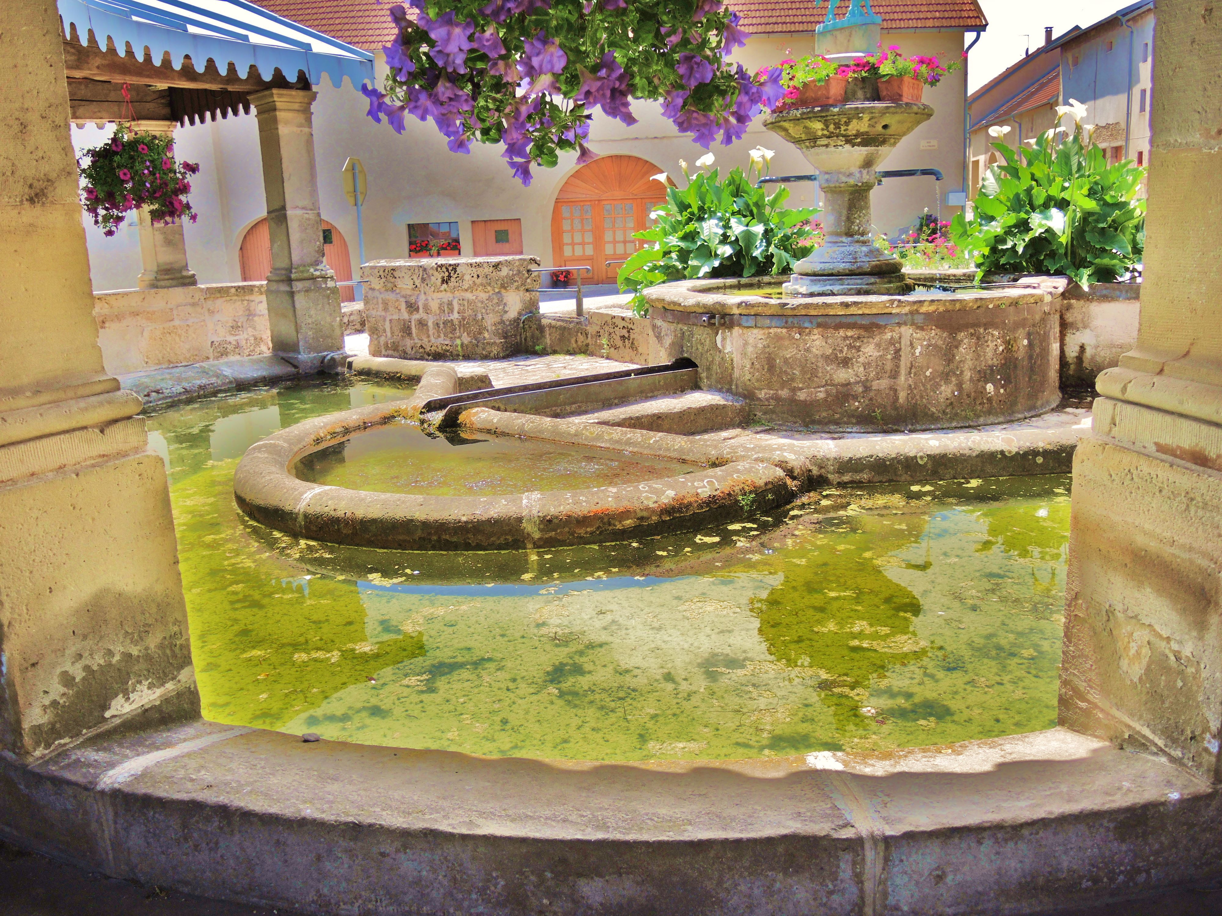 Fontaine saint Martin